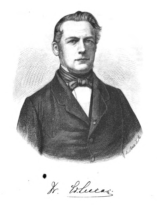 Dr. Ed. Lucas.